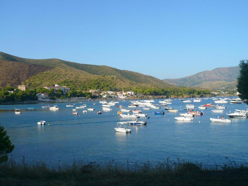 LA baia di ogliastro marina a Castellabate (salerno)